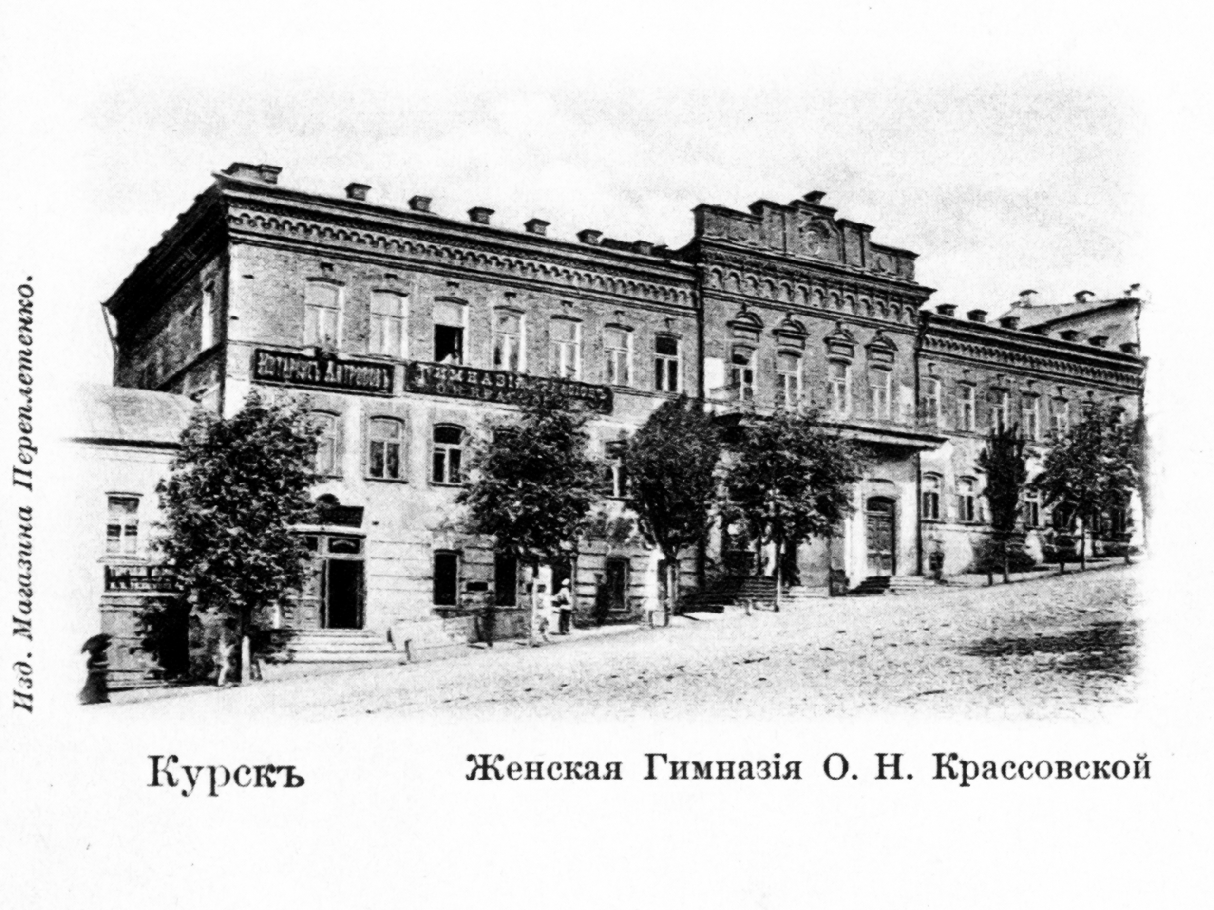 Здание частной женской гимназии Красовской О.Н. на Фроловской улице в Курске, действовавшей в 1894-1907 годы. В подписи открытки сделана ошибка в фамилии содержательницы гимназии.